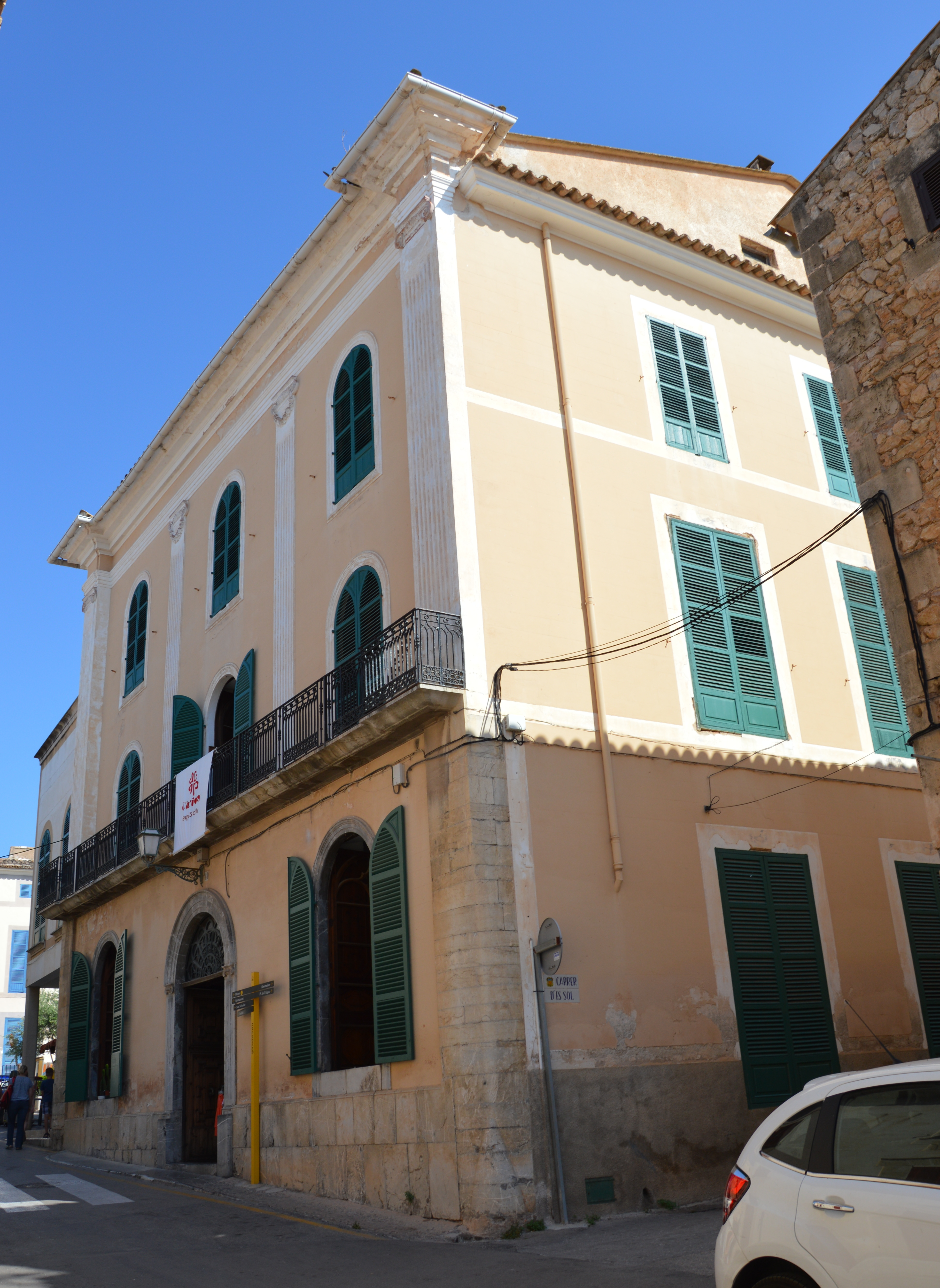 Sozialzentrum in Arta, Mallorca, neben dem Haus Cal Marques